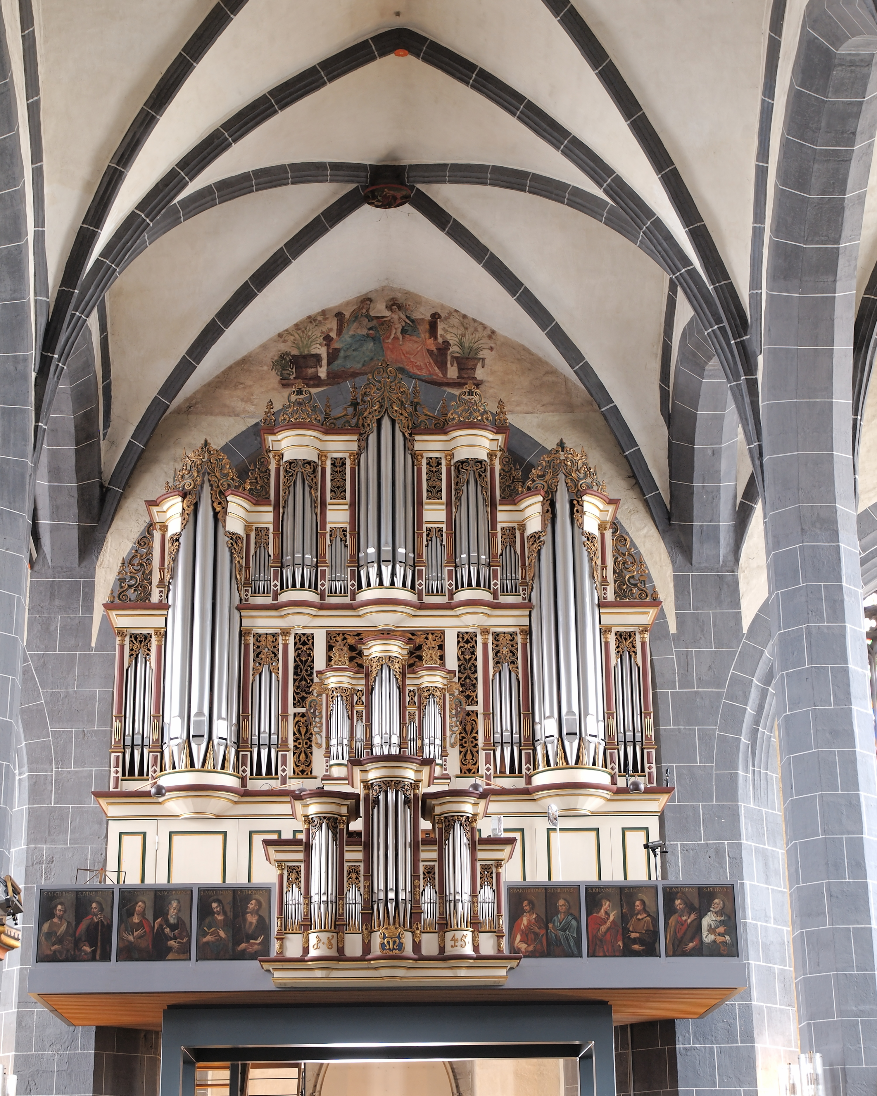 Orgel von in der Kirche St. Blasius, Hannoversch Münden, errichtet 1977 von der Firma Orgelbau Klais